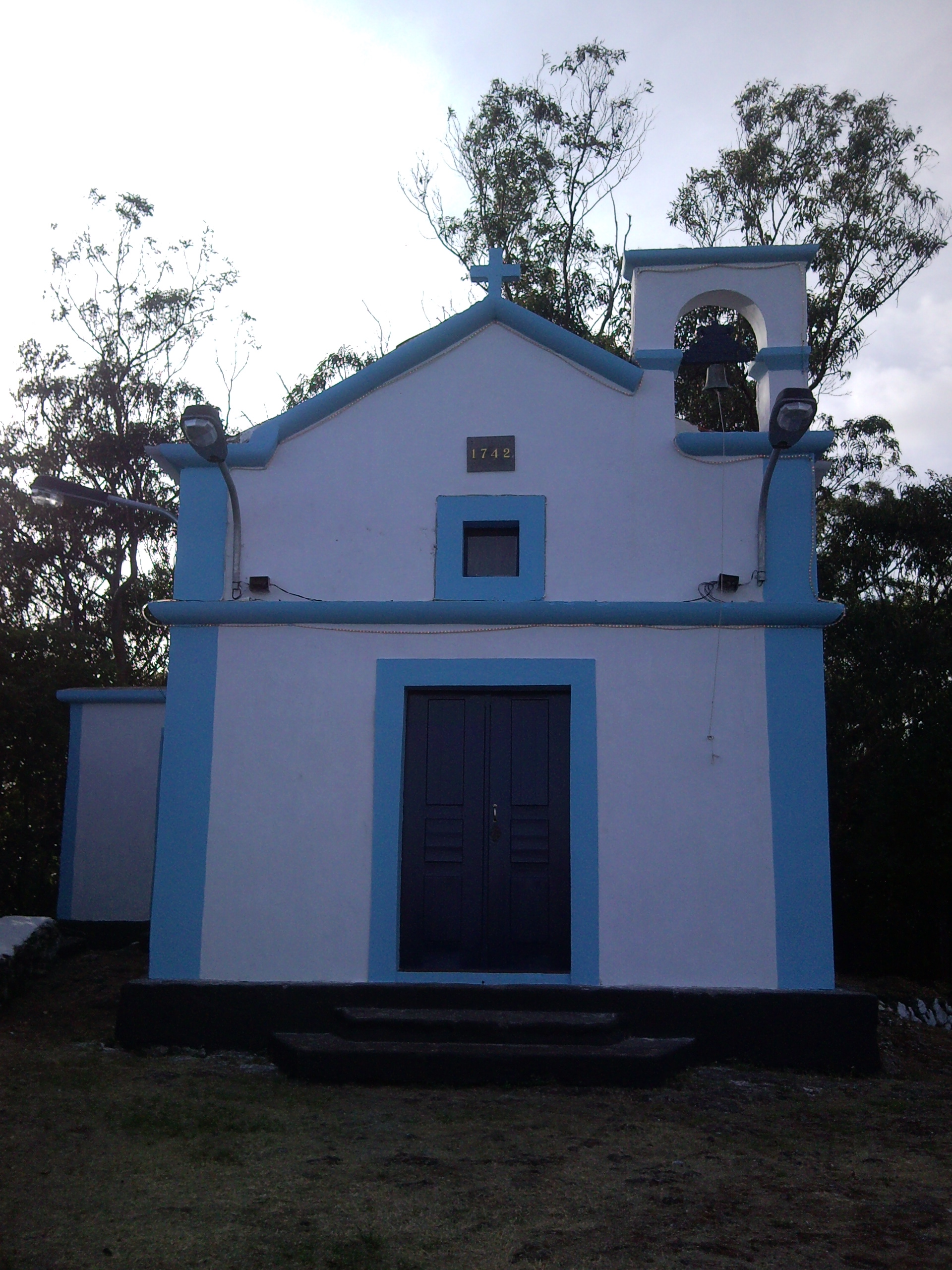 Ermida de Nossa Senhora da Penha de França, Pico da Urze, São Pedro, Angra Heroísmo, Arquivo de Villa Maria, ilha Terceira, Açores